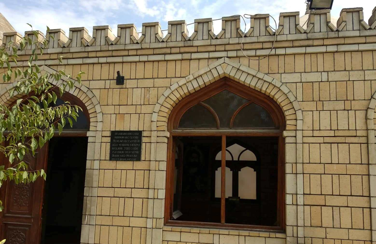 Maştağa Seyid Kamil ağa türbəsi